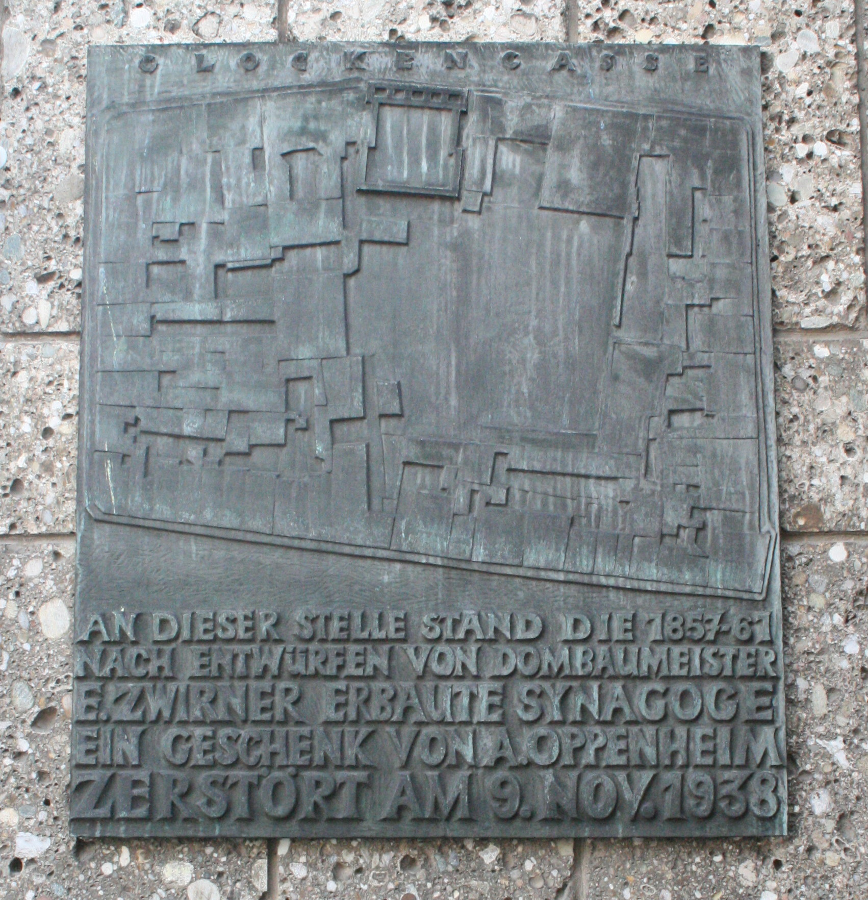 Die Bronzeplatte erinnert an den Standort der alten Synagoge auf dem Offenbachplatz in Köln